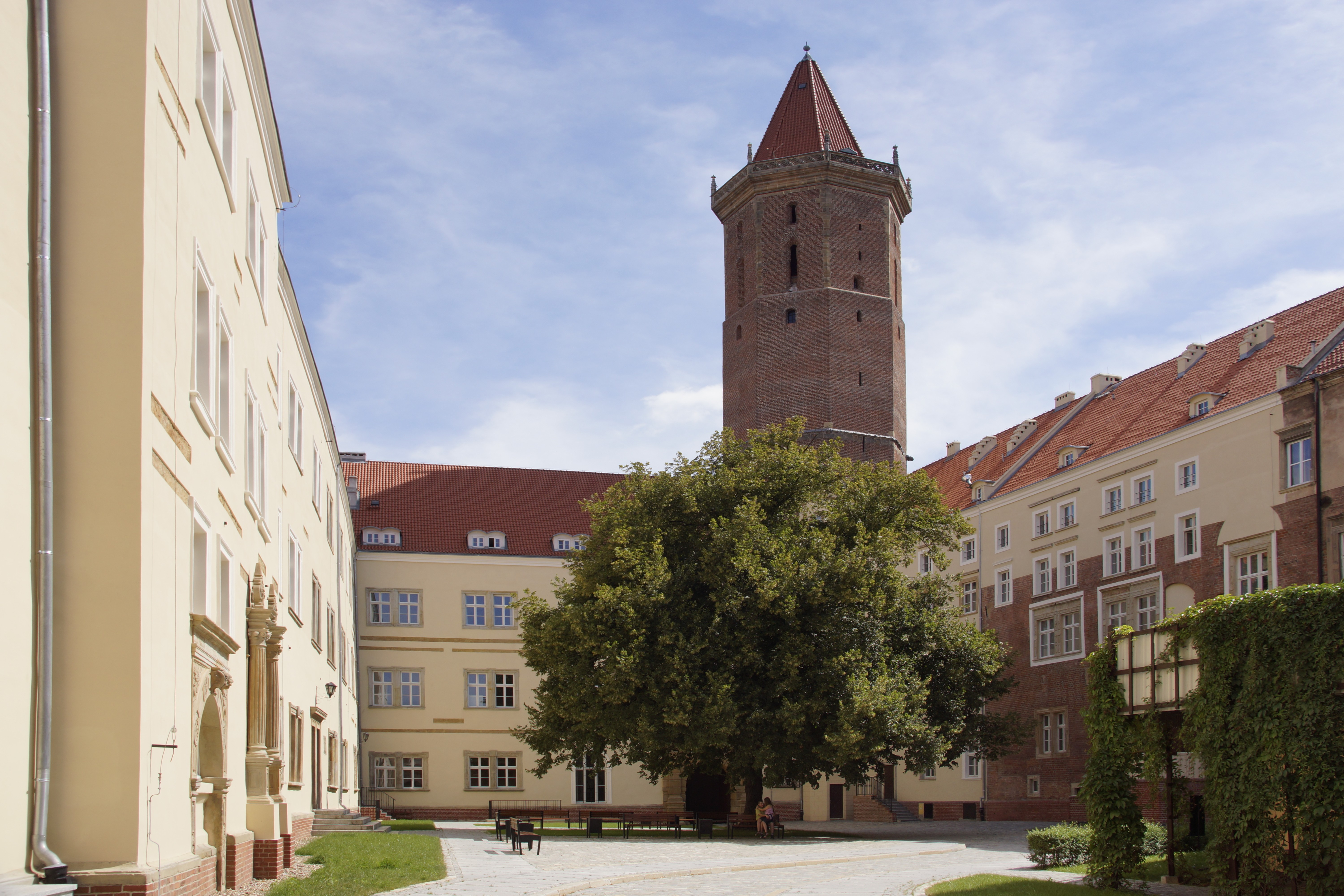 Dziedziniec zamku piastowskiego Legnica, ul. Zamkowa